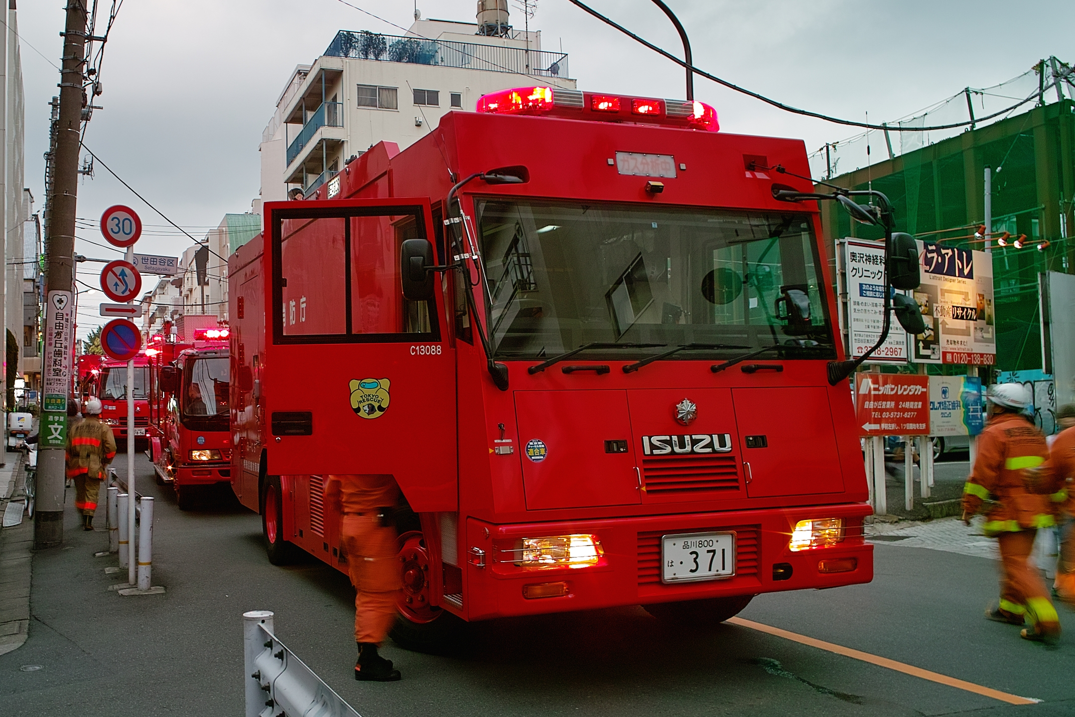 Tokyo fire department trucks, Jiyugaoka, Tokyo, Japan.